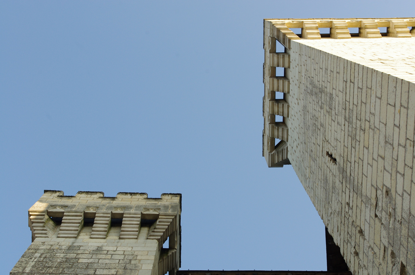 Mâchicoulis du porche de la collégiale de Candes Saint-Martin